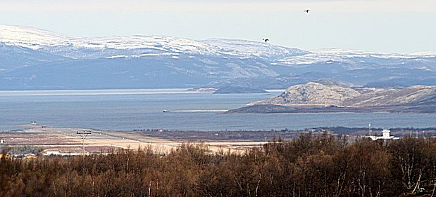 Lakselv Airport - 1